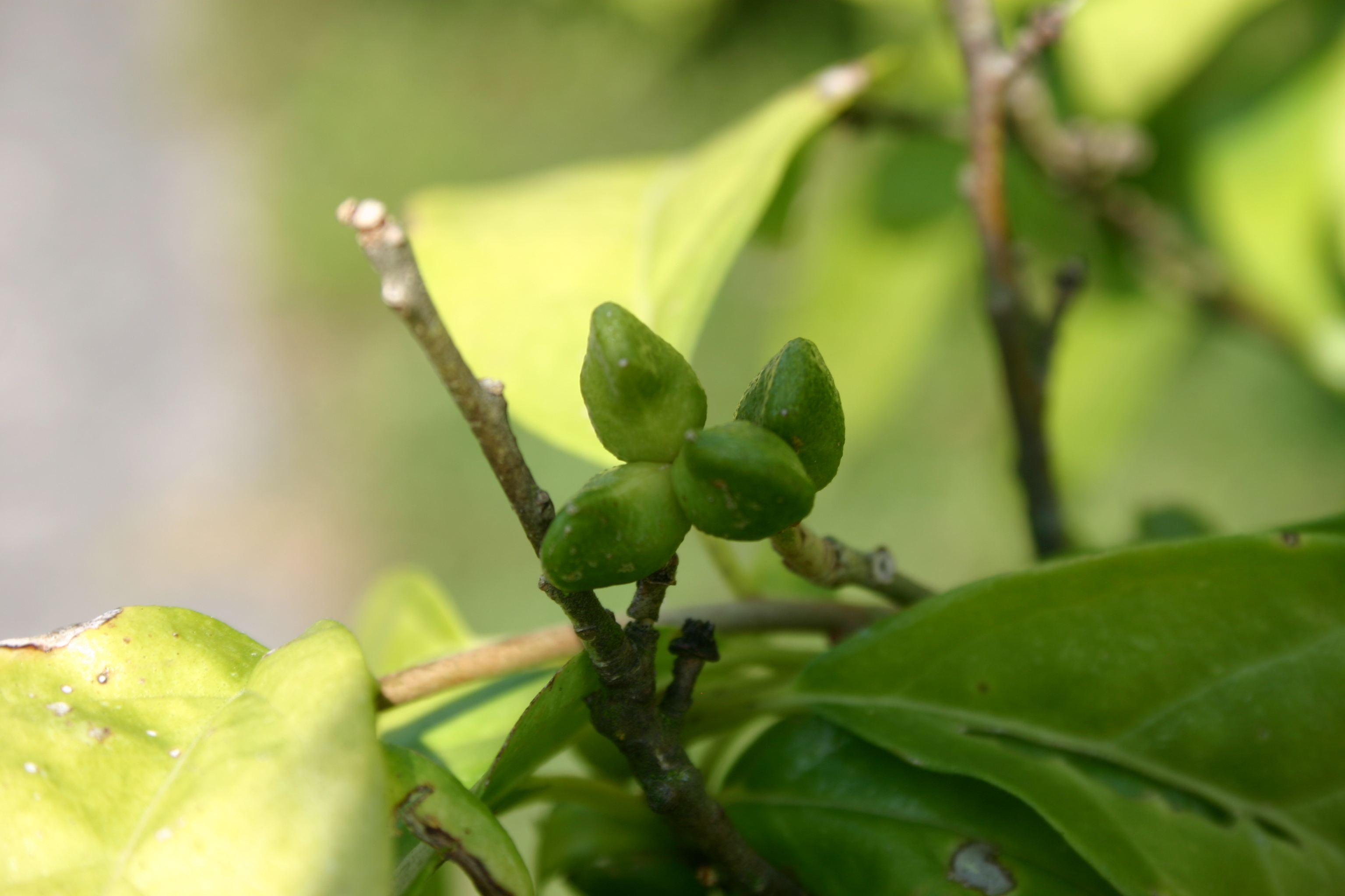 Unreife Frucht von Orixa japonica